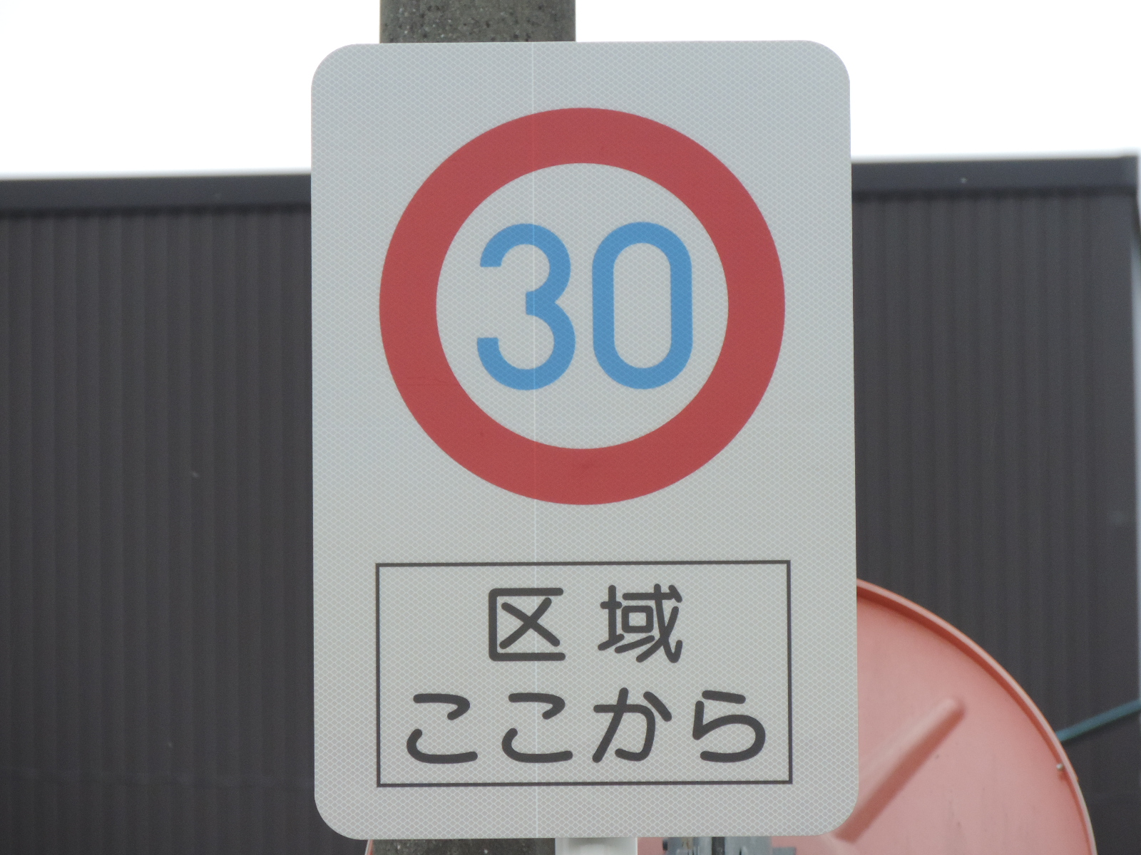 「最高速度」の背面板付き規制標識（滋賀県草津市）